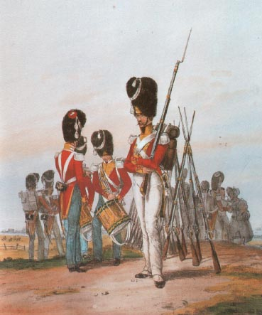 kgl. Sächsische Gardeinfanterie Mitte des 19. Jahrhunderts